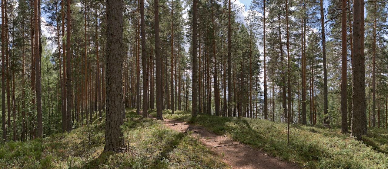 Leivonmäki National Park in Finland